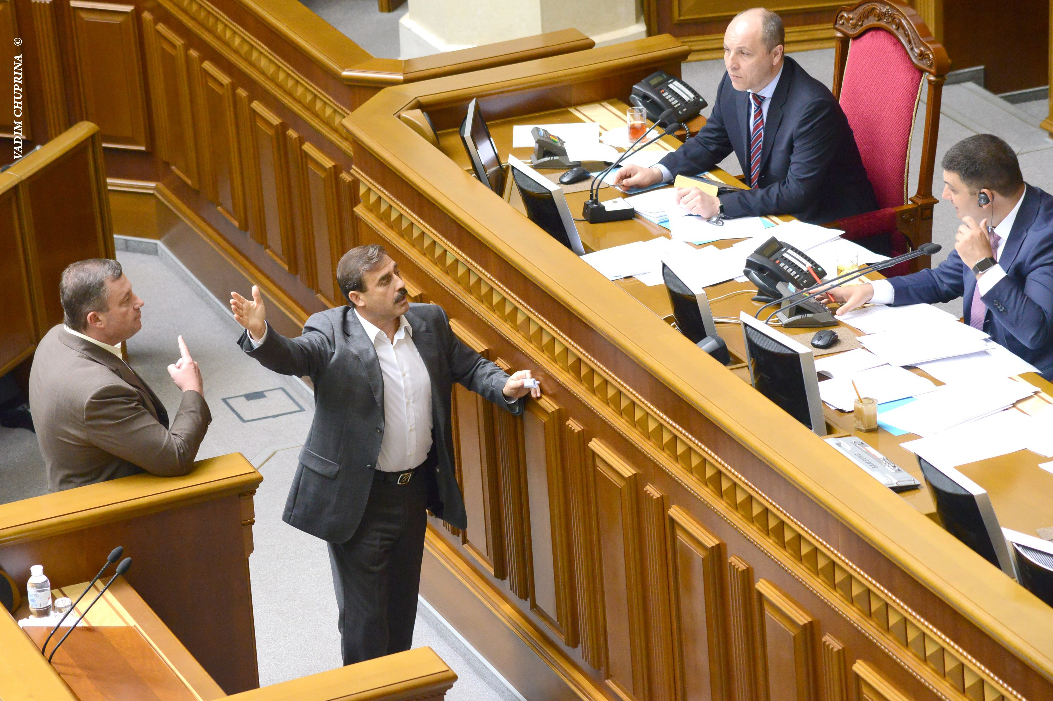 ВЕРХОВНА РАДА УКРАЇНИ 2015 , фото Вадим Чуприна